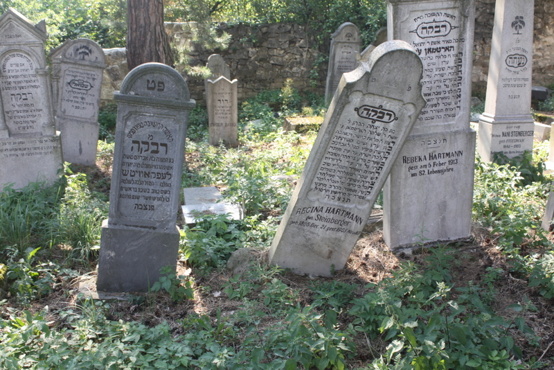 בית העלמין היהודי ב Jewish Cemetery of Spišské Podhradie